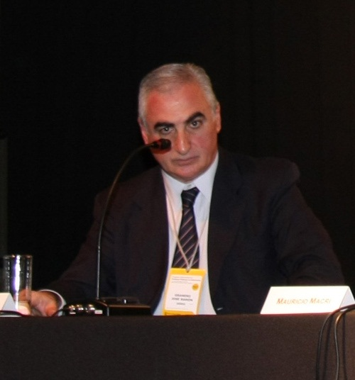 Secretario del SEDRONAR, J. Granero.